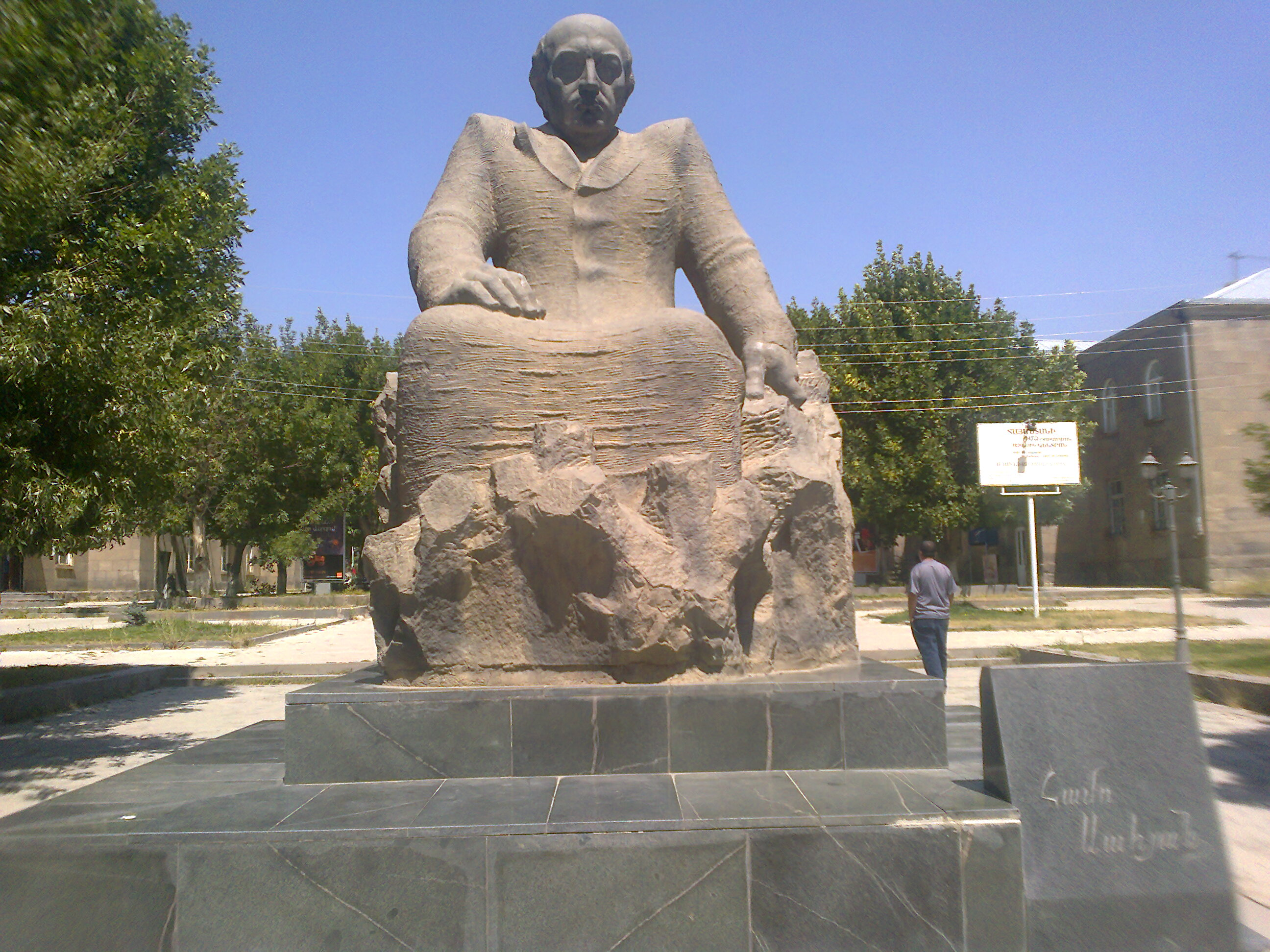 Համո Սահյանի հուշարձանը Սիսիանում 6/27